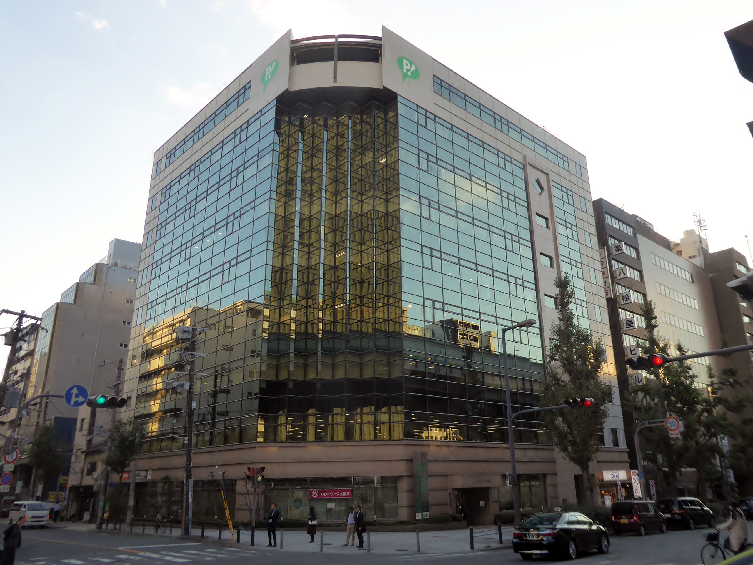 ピップ本社を撮影。1-3階に大阪東公共職業安定所が入る。